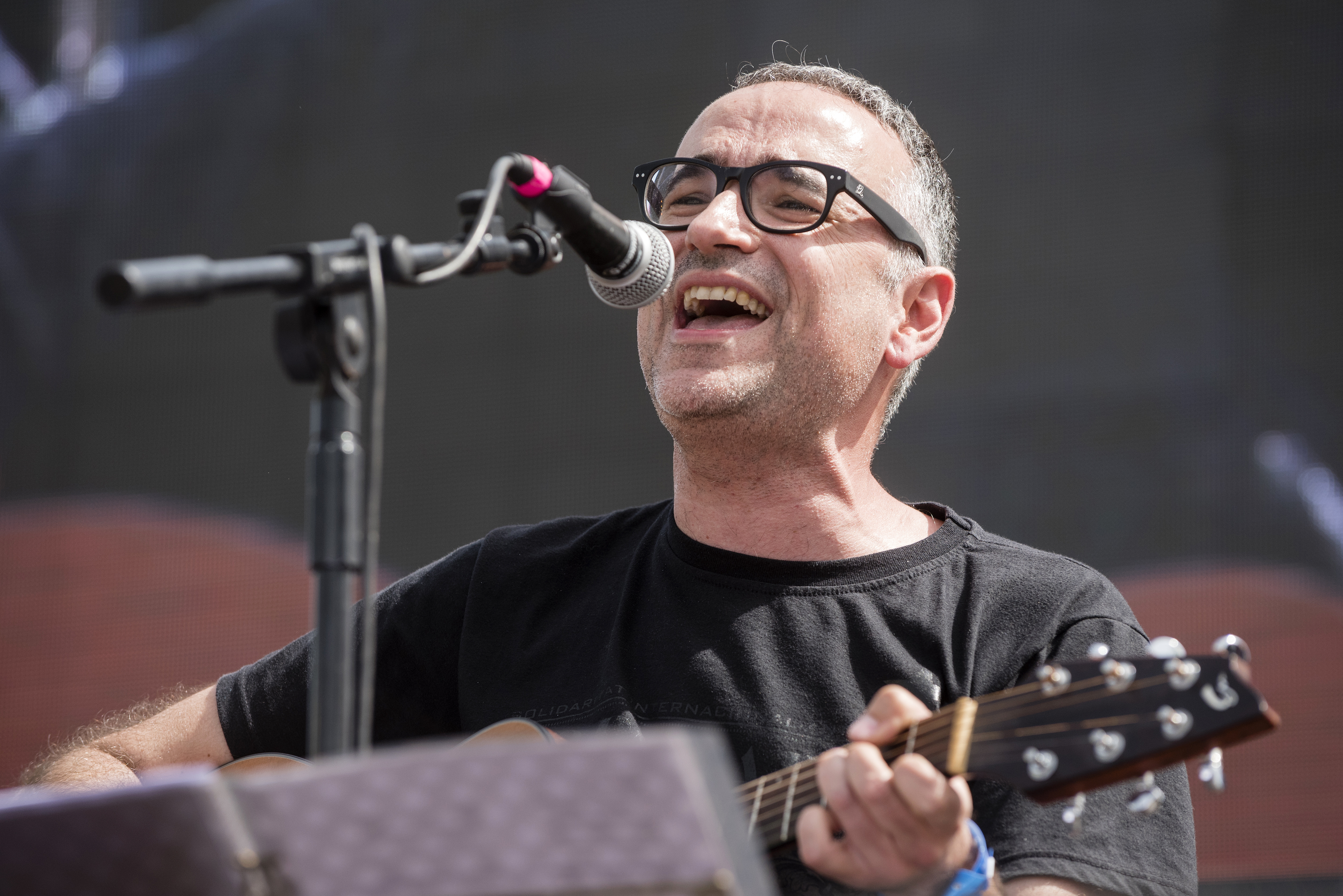 _DC73363